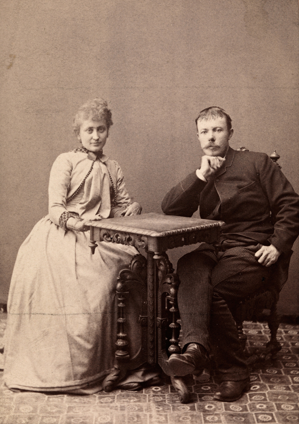 Tittel / Title: Portrett av Arne og Hulda Garborg, ca. 1890 Motiv / Motif: Visittkort Bildesignatur / Image Number: blds_03754